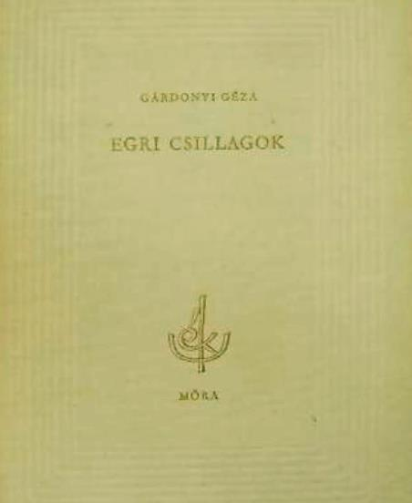 Én Nagy Könyvem az én könyvtáramban az Egri csillagok (Bornemissza Gergely élete) borító lapja Az én könyvtáram sorozatban az ifjúsági irodalom remekei 1-3. kötet 1966-os kiadása lapolvasóval